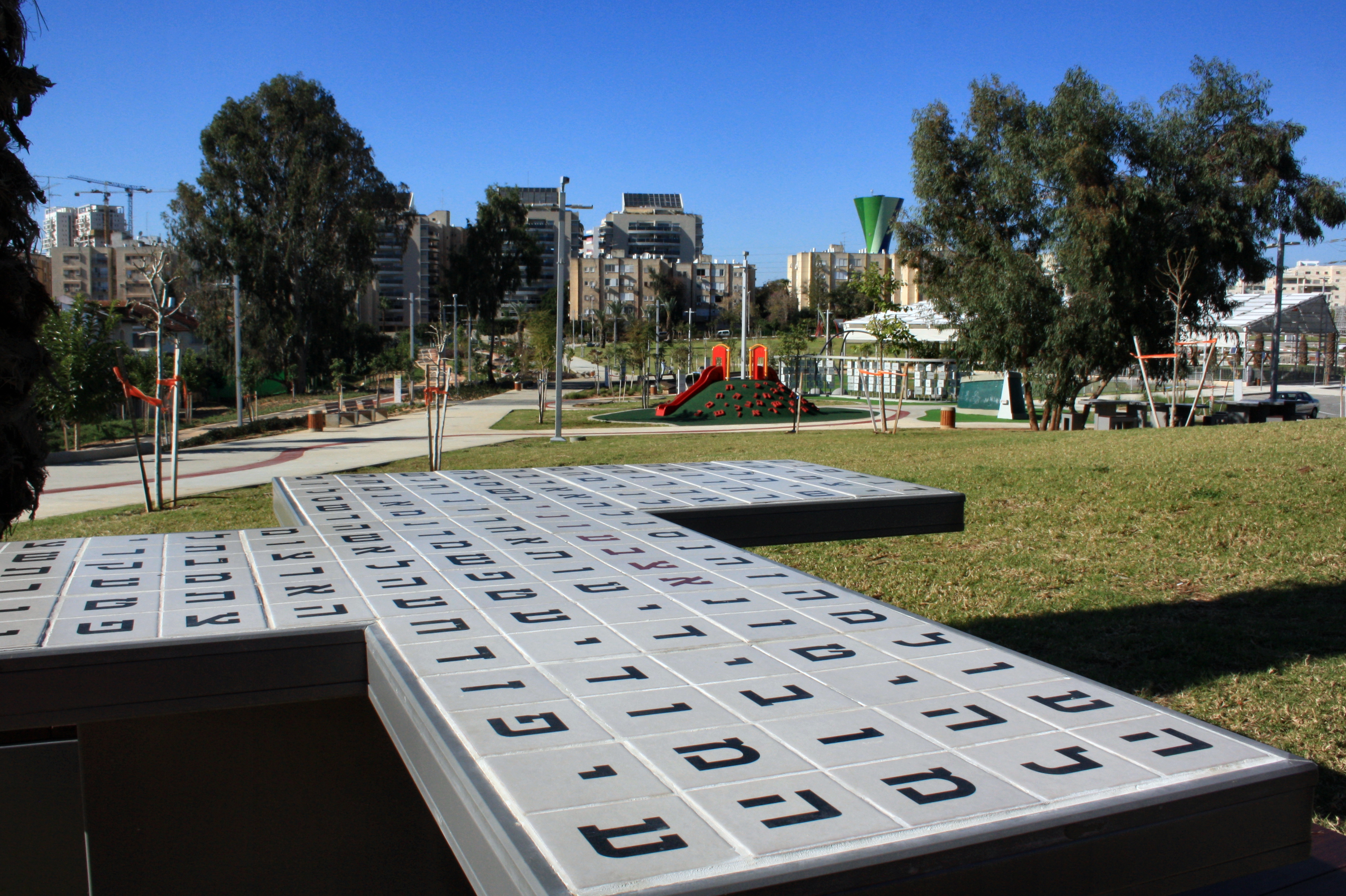 שולחנות עם תפזורת מילים ב"גן בעברית", ראשון לציון.